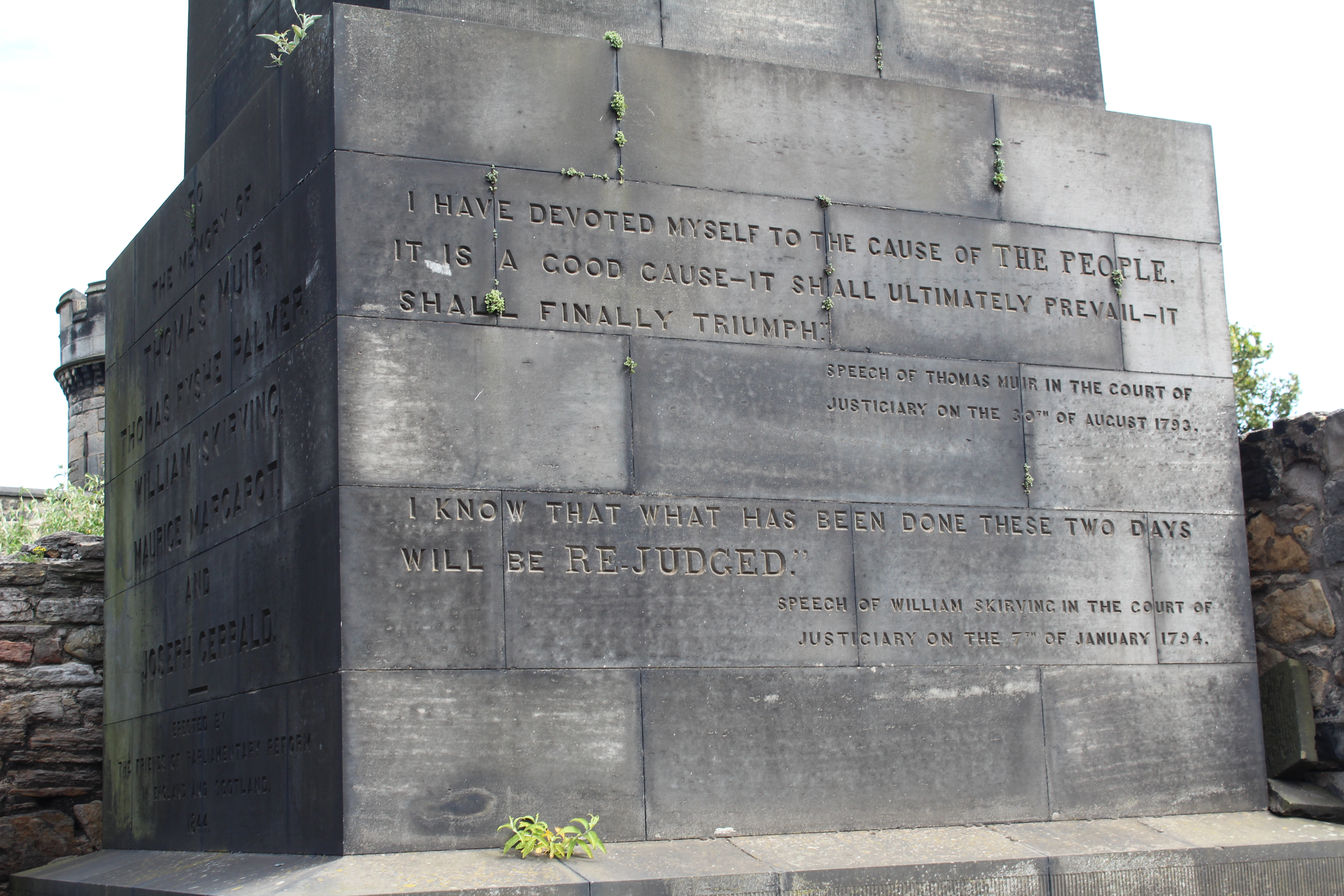 Monument des Martyrs, Édimbourg.